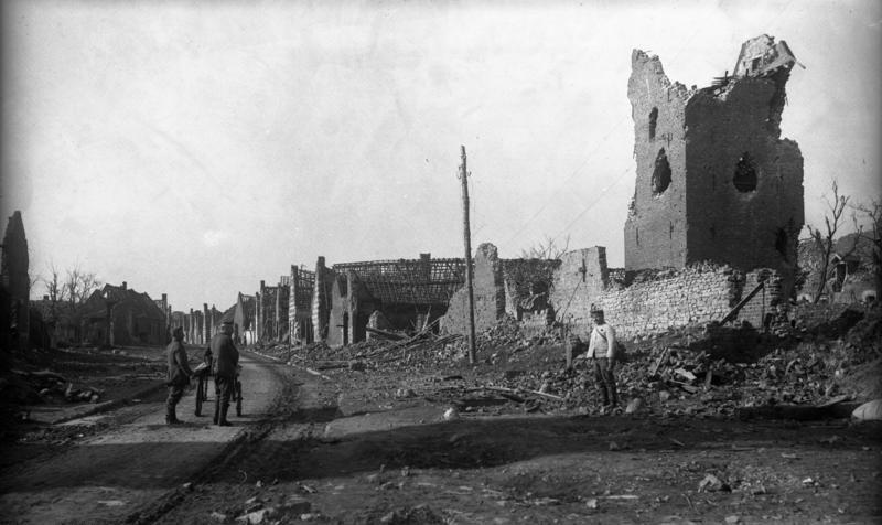 Cantaing die zerstörte Hauptstraße Febr. 1918 Information added by Wikimedia users.